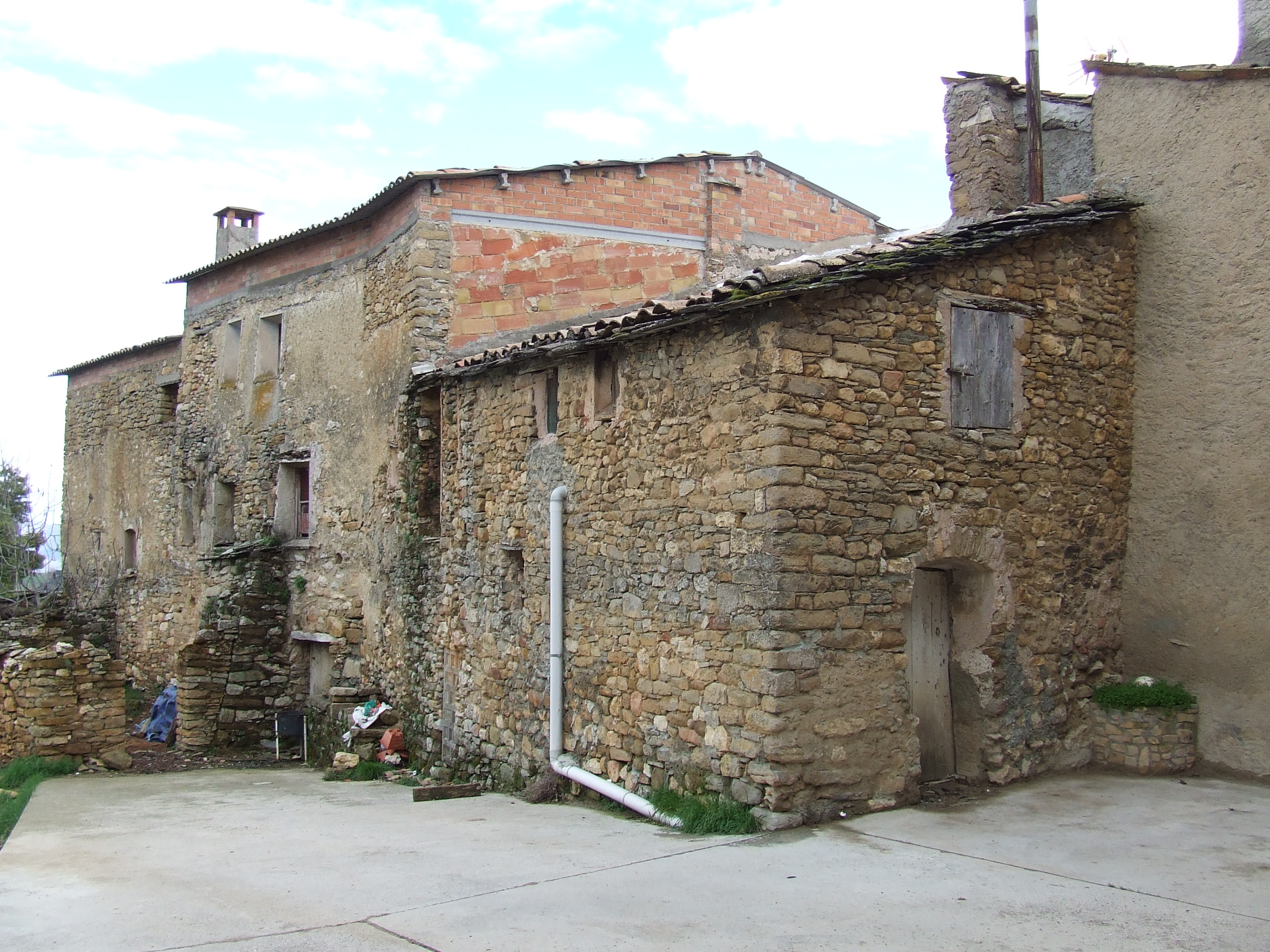 Casa medieval a Sant Esteve de la Sarga (Pallars Jussà)